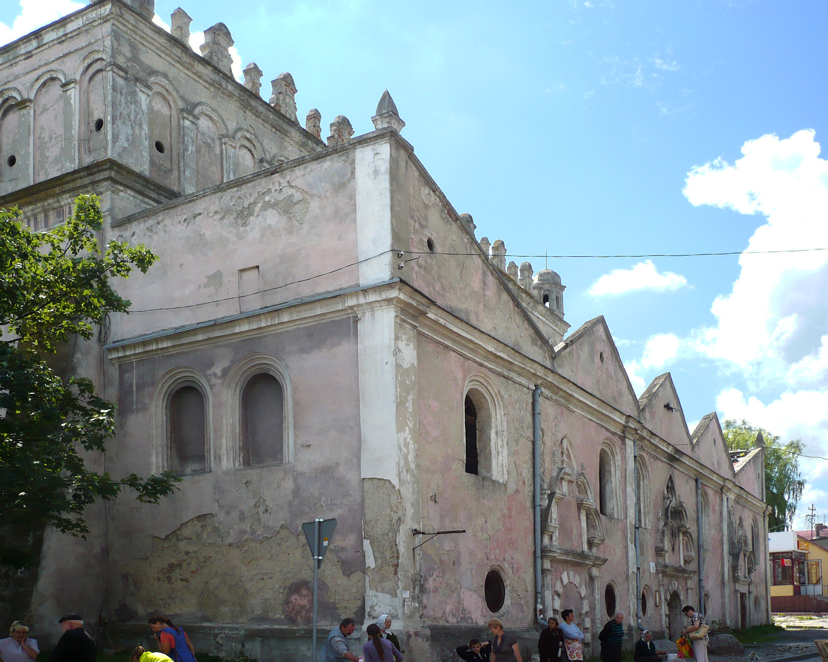 Synagoga